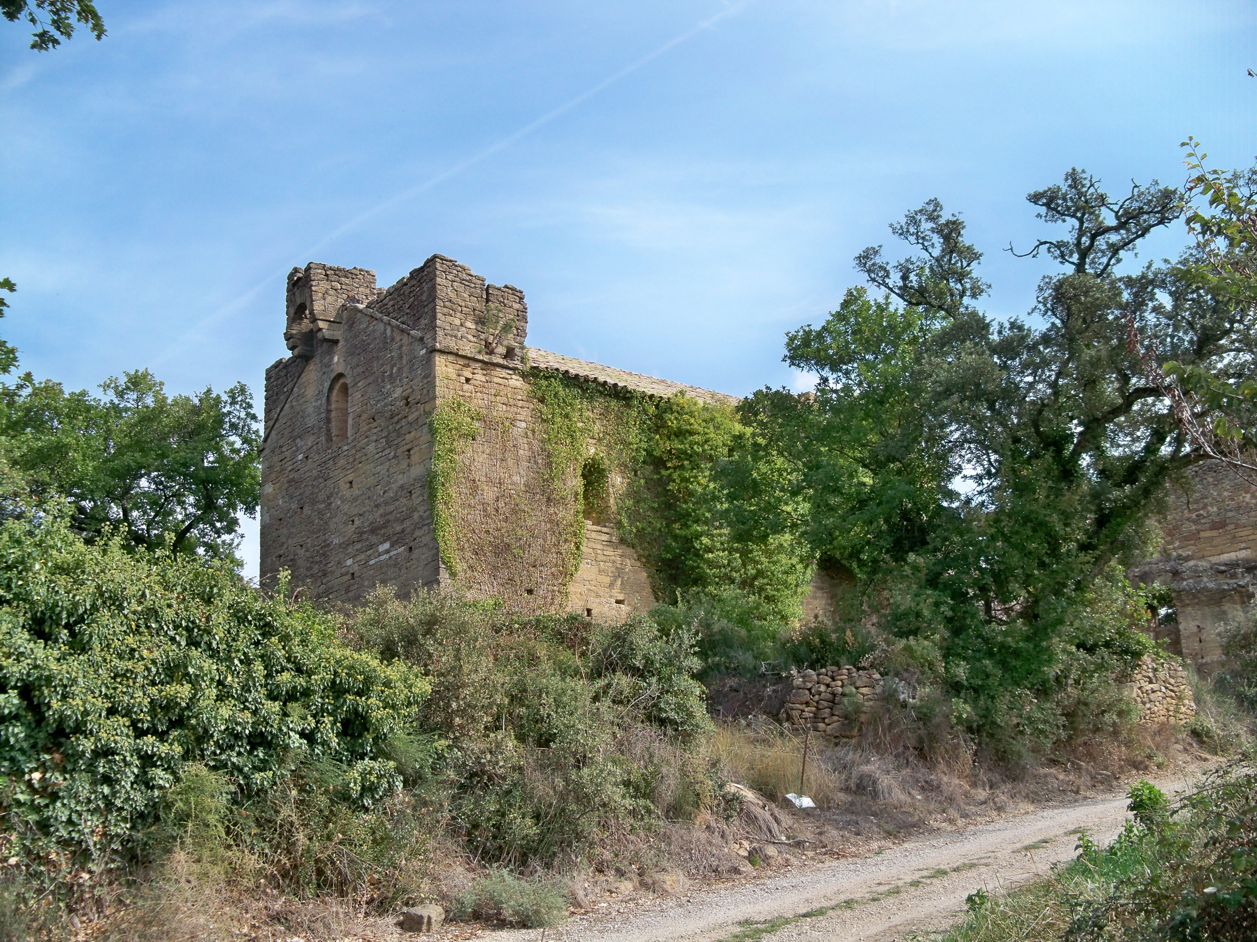 Chapelle Notre-Dame-des-Aubagnons, (Inscription, 1926) .